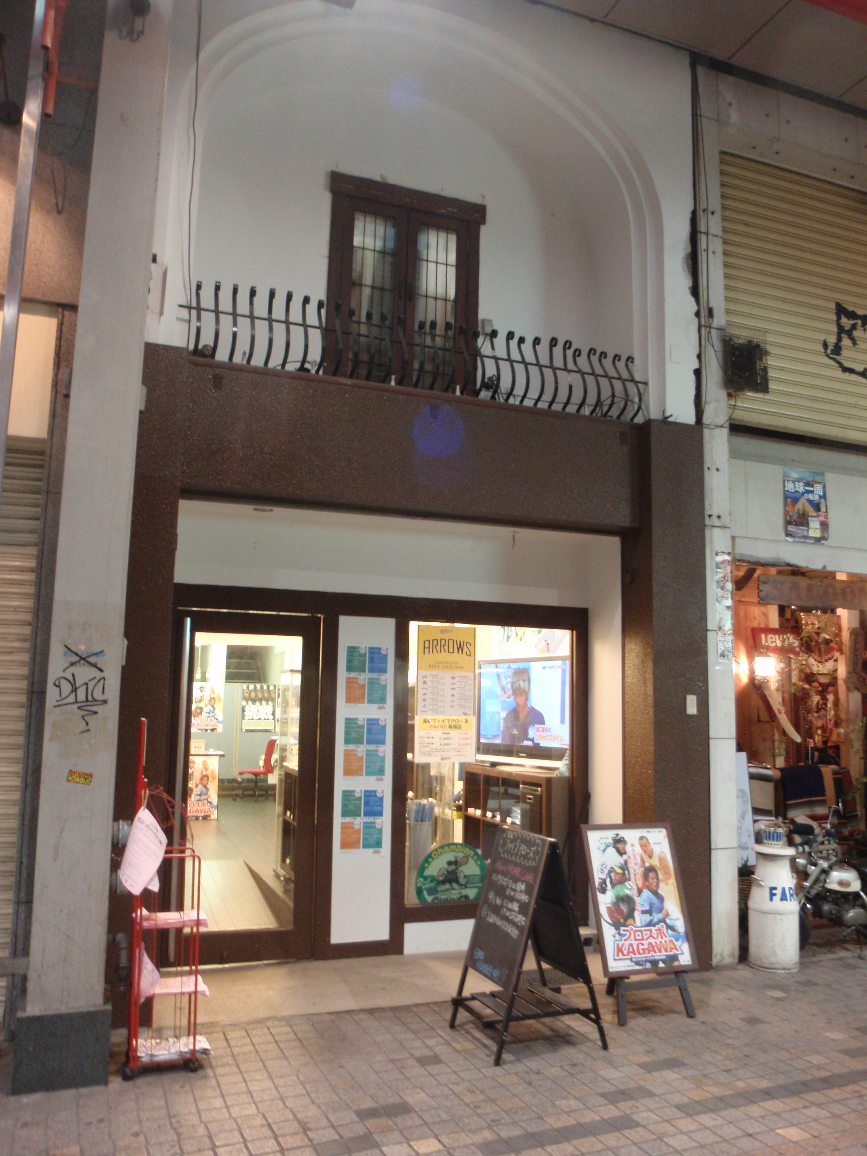 香川県高松市常磐町一丁目にあるIBLJの本社。